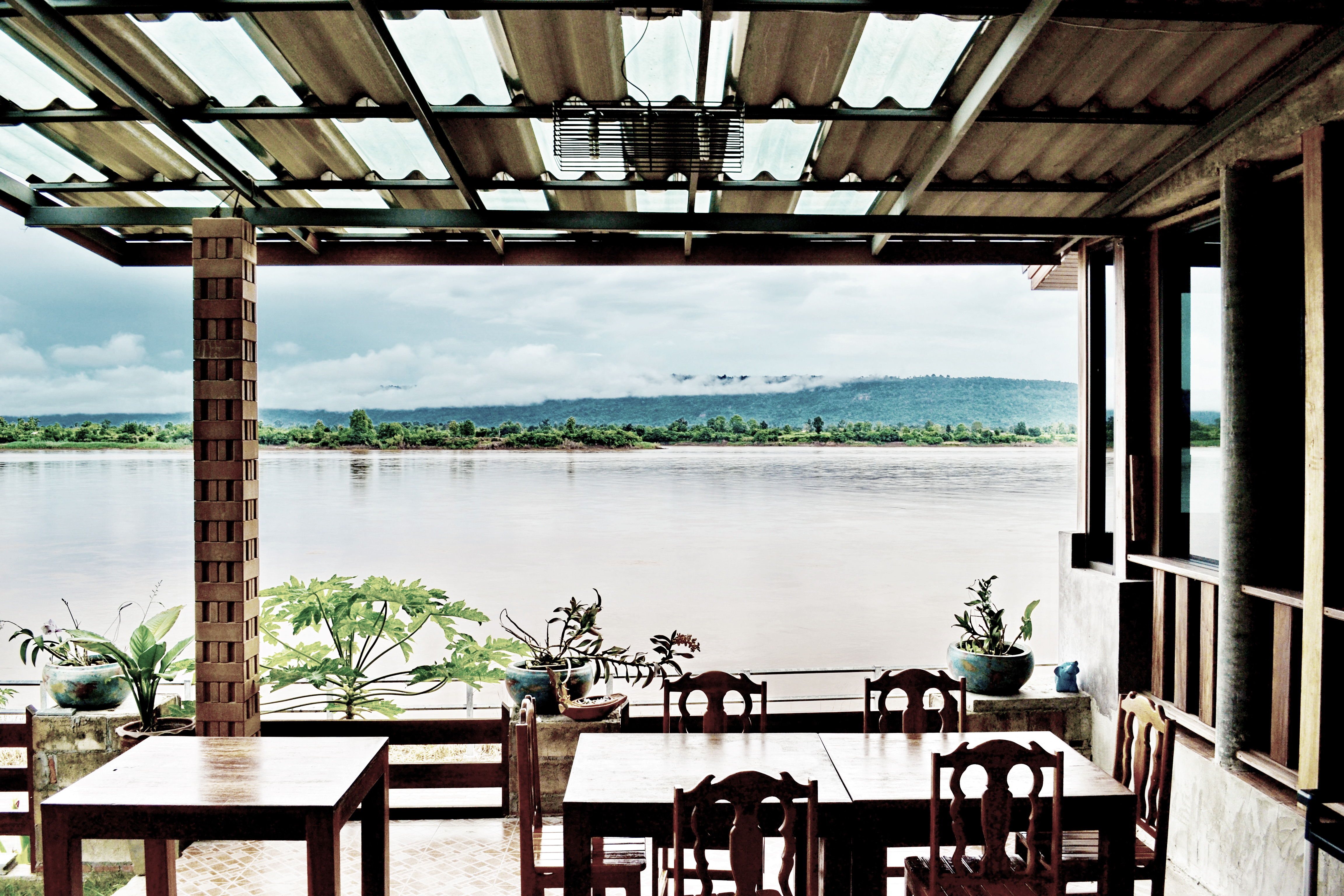 ทานอาหารเช้า กับ วิวแม่น้ำโขง : From resort's restaurant @ Sang Khom